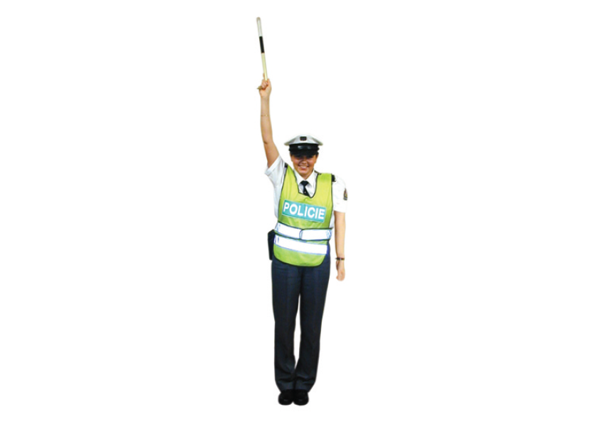 Signál „Pozor!“ (Příloha č. 9 k vyhlášce č. 30/2001 Sb. • Pokyny policisty při řízení provozu na pozemních komunikacích. Příloha č. 9 k vyhlášce č. 30/2001 Sb.)